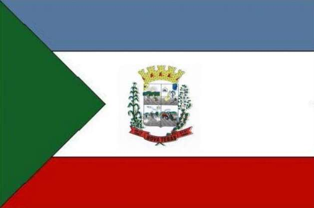 Bandeira de Nova Tebas